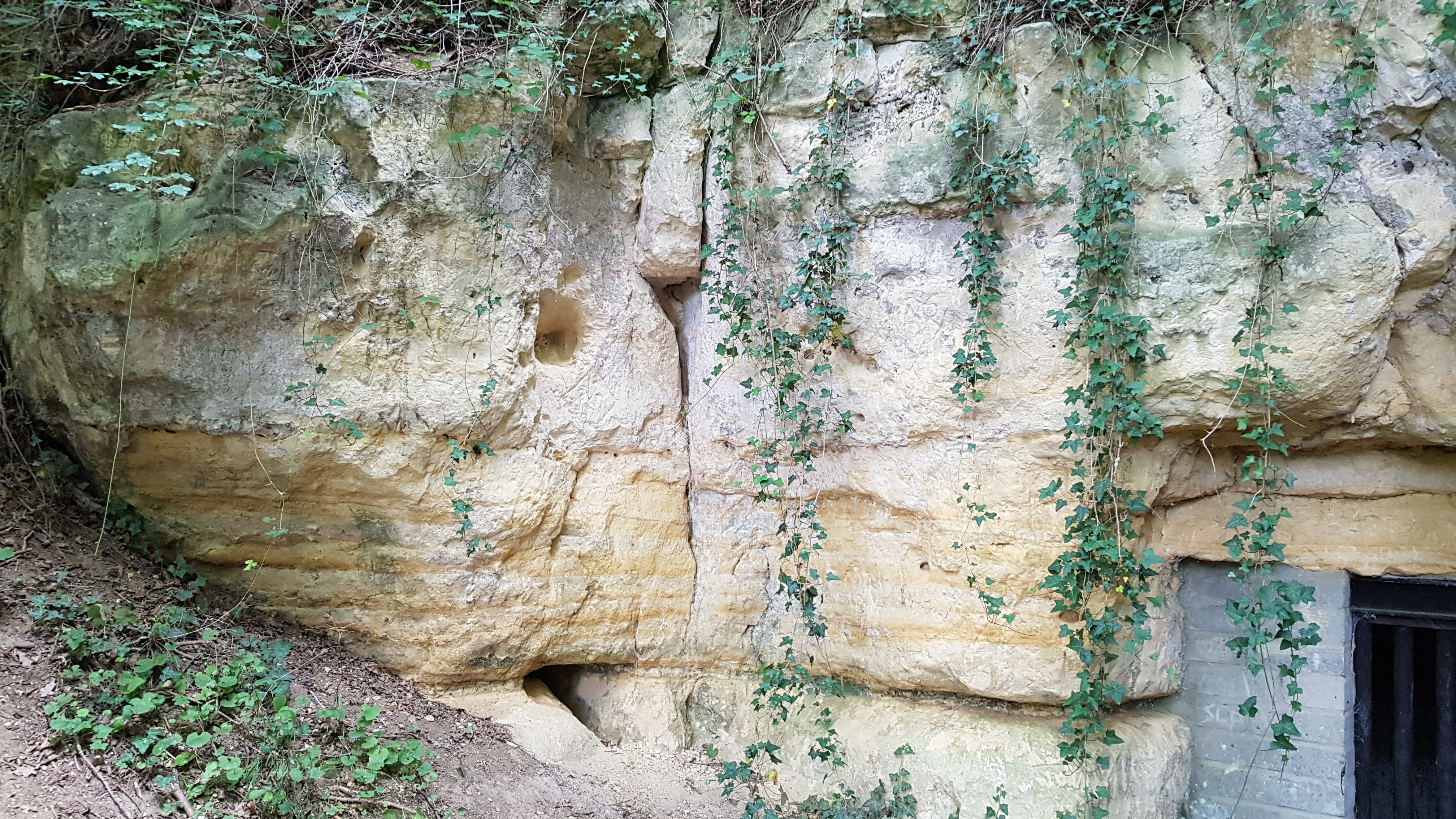 Steinberggroeve in Savelsbos, Rijckholt, Nederland